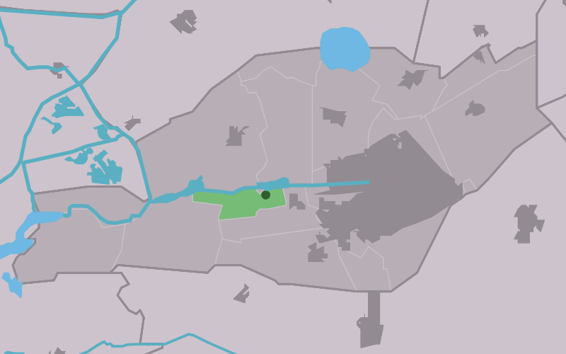 Kaartsje fan himrik fan Smelle Ie